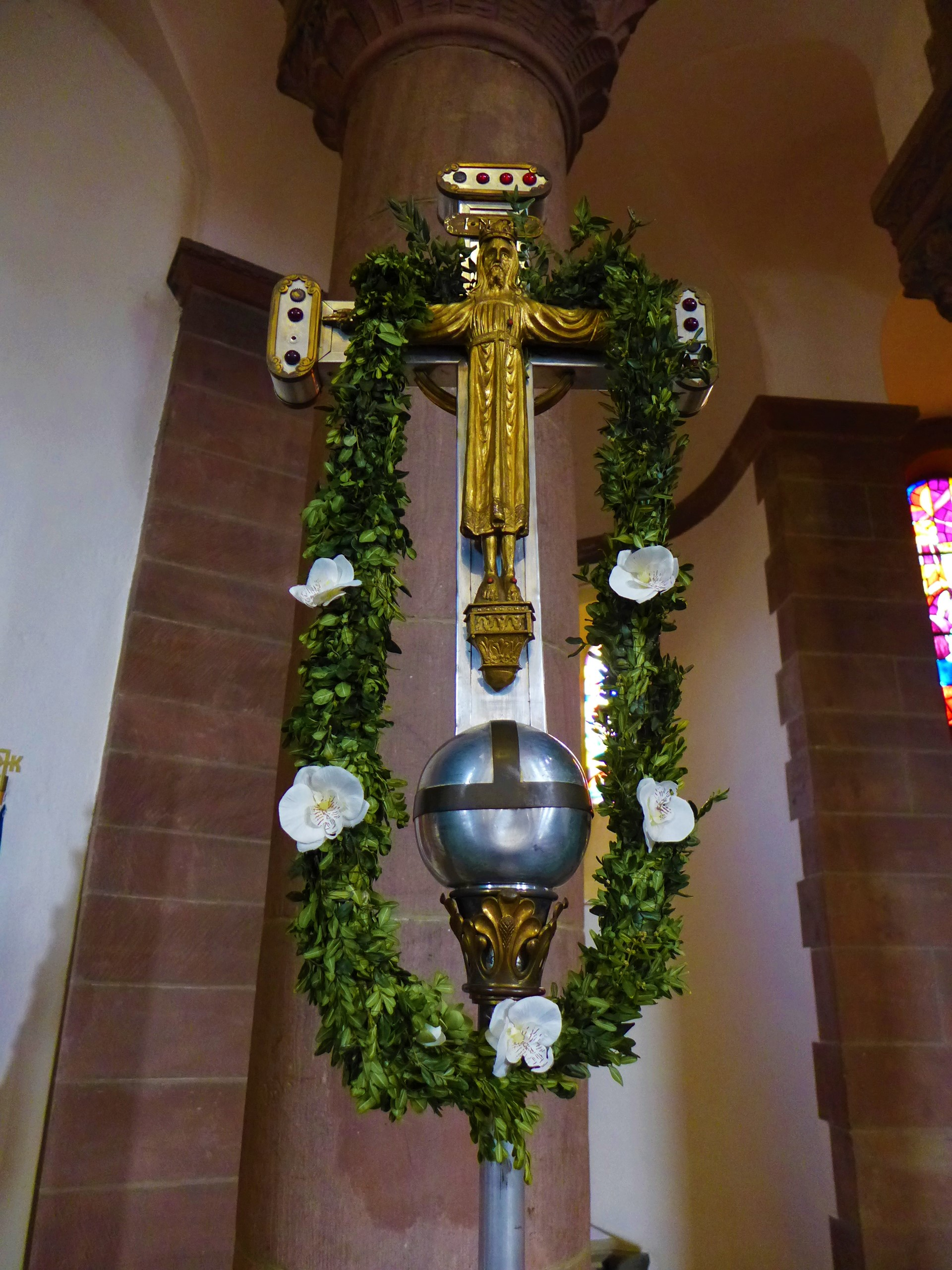 Saardom, Vortragekreuz